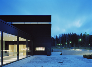 Ceremonibyggnad vid Täby södra begravningsplats, Stockholm. Byggnaden är gestaltad av Temagruppen Sverige AB och har blivit nominerad till Rödfärgspriset.